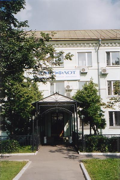 Офис «Аэрофлота» в посёлке аэропорта Шереметьево